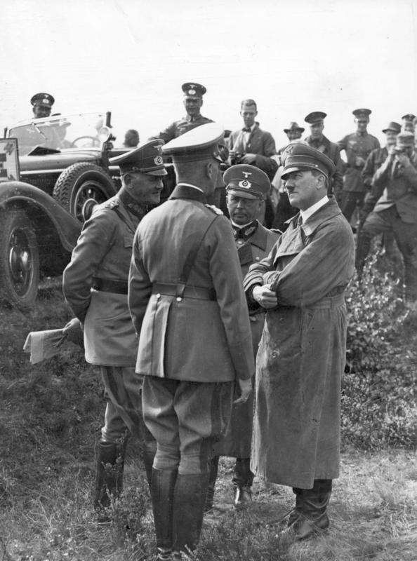 Zentralbild Adolf Hitler bei den Herbstmanövern des Heeres im September 1935 in Celle UBz: v.l.n.r.: Reichsminister Generaloberst Werner von Blomberg, Oberbefehlshaber des Heeres General Werner Freiherr von Fritsch, Adolf Hitler (rechts im Bild). 29 797-35